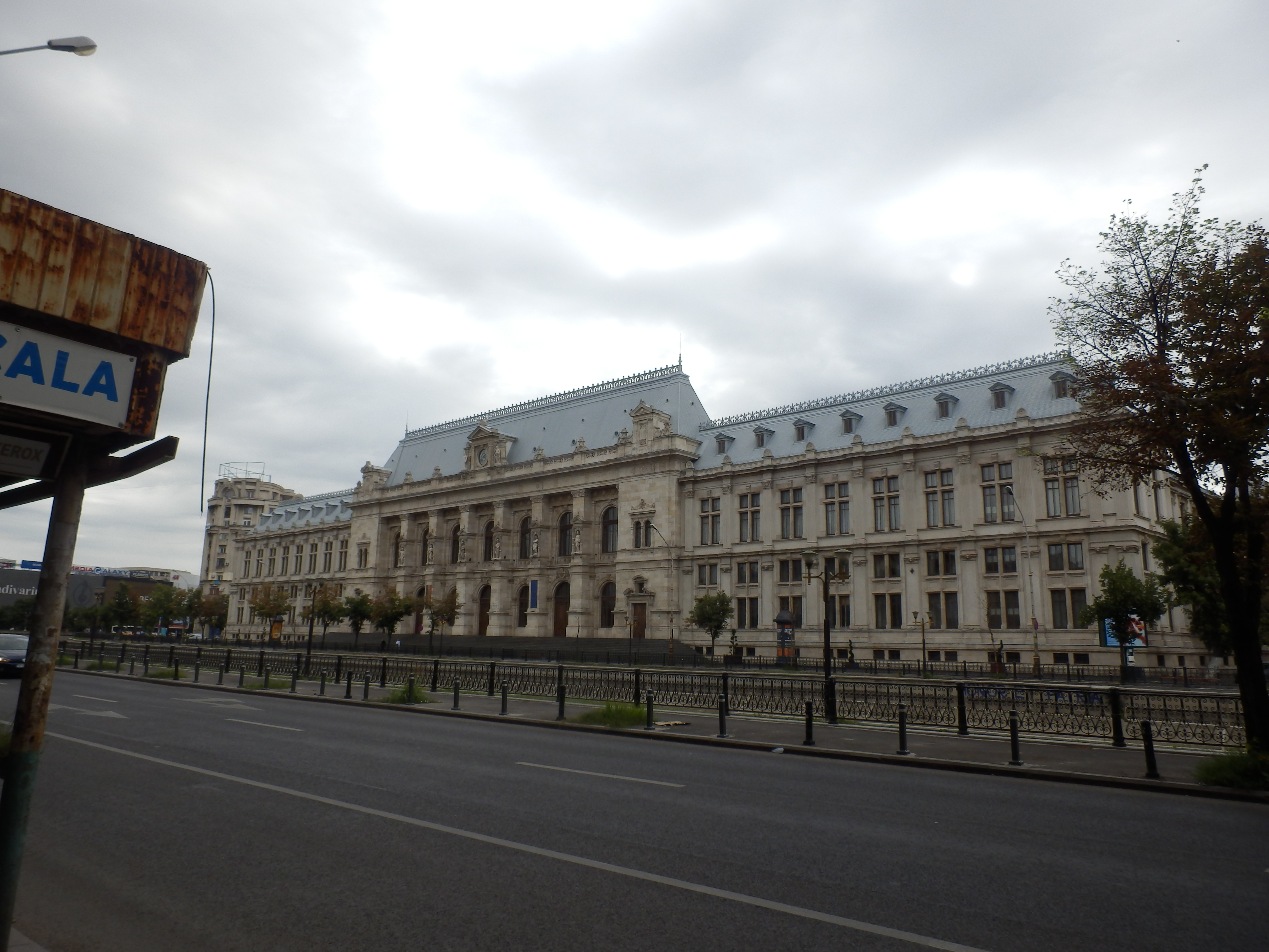 Bucharest, Romania